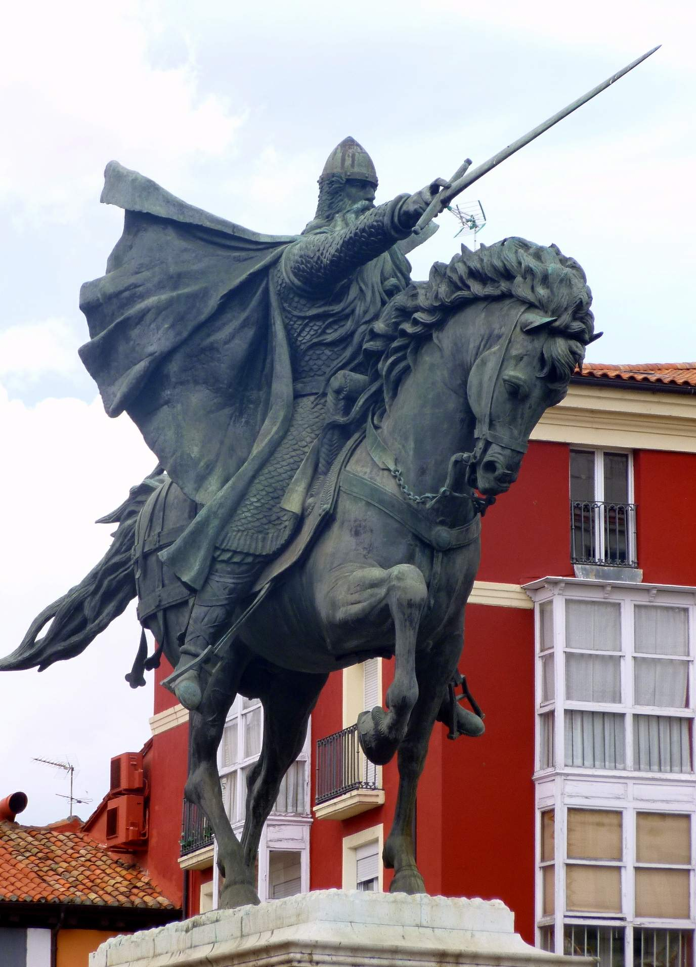 Estatua del Cid (Burgos)